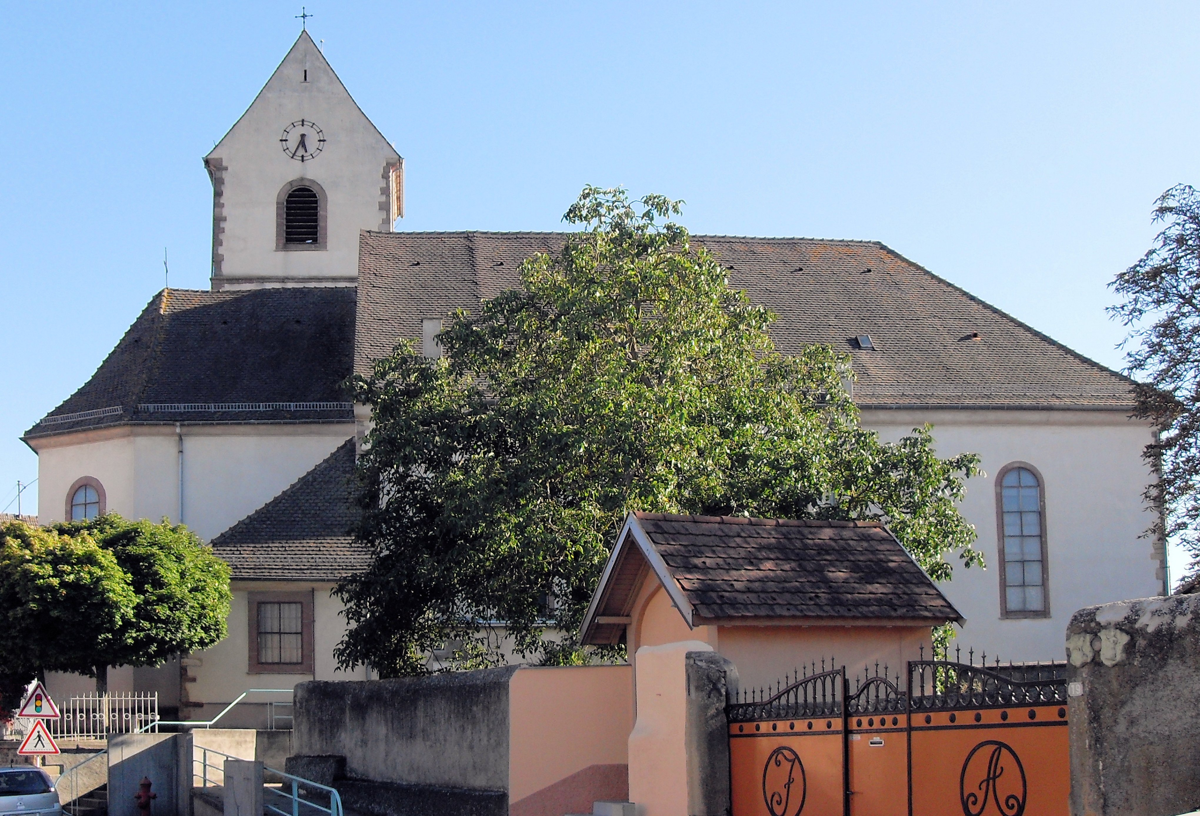 L'église Saint-Laurent à Hirtzfelden